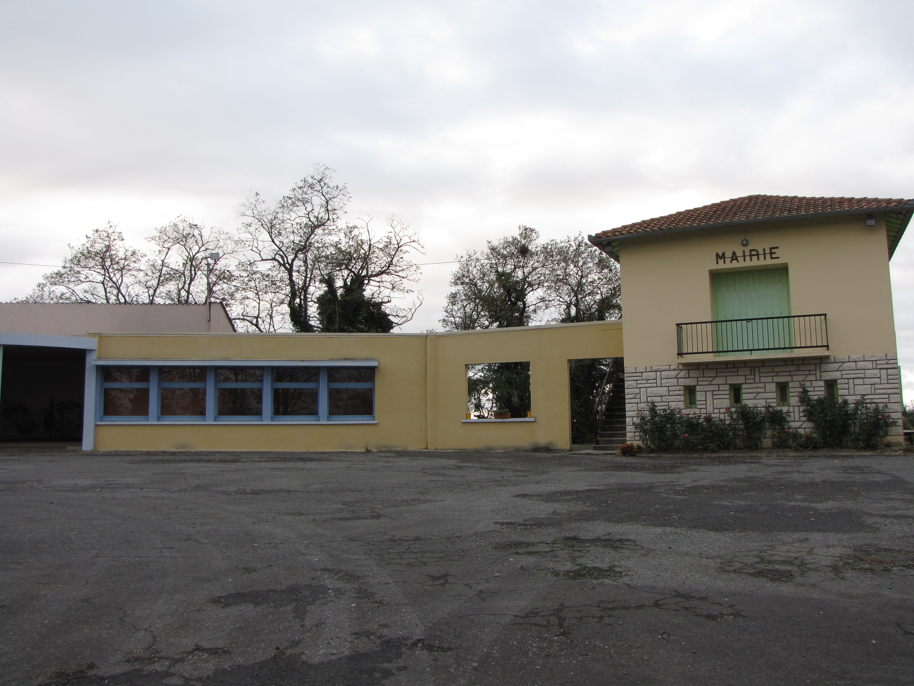 Mairie de Latour